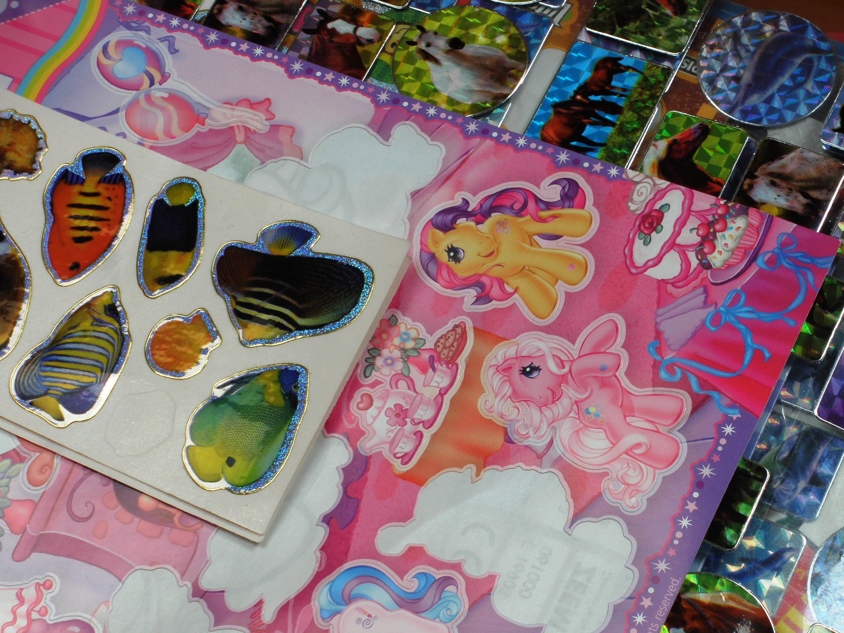 Beloningsstickers.